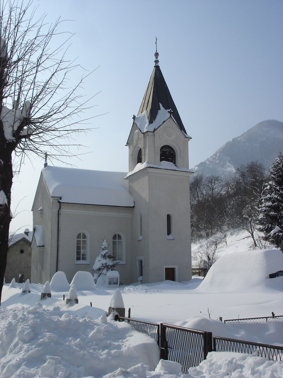 Malo veci snjeg nego inace :)